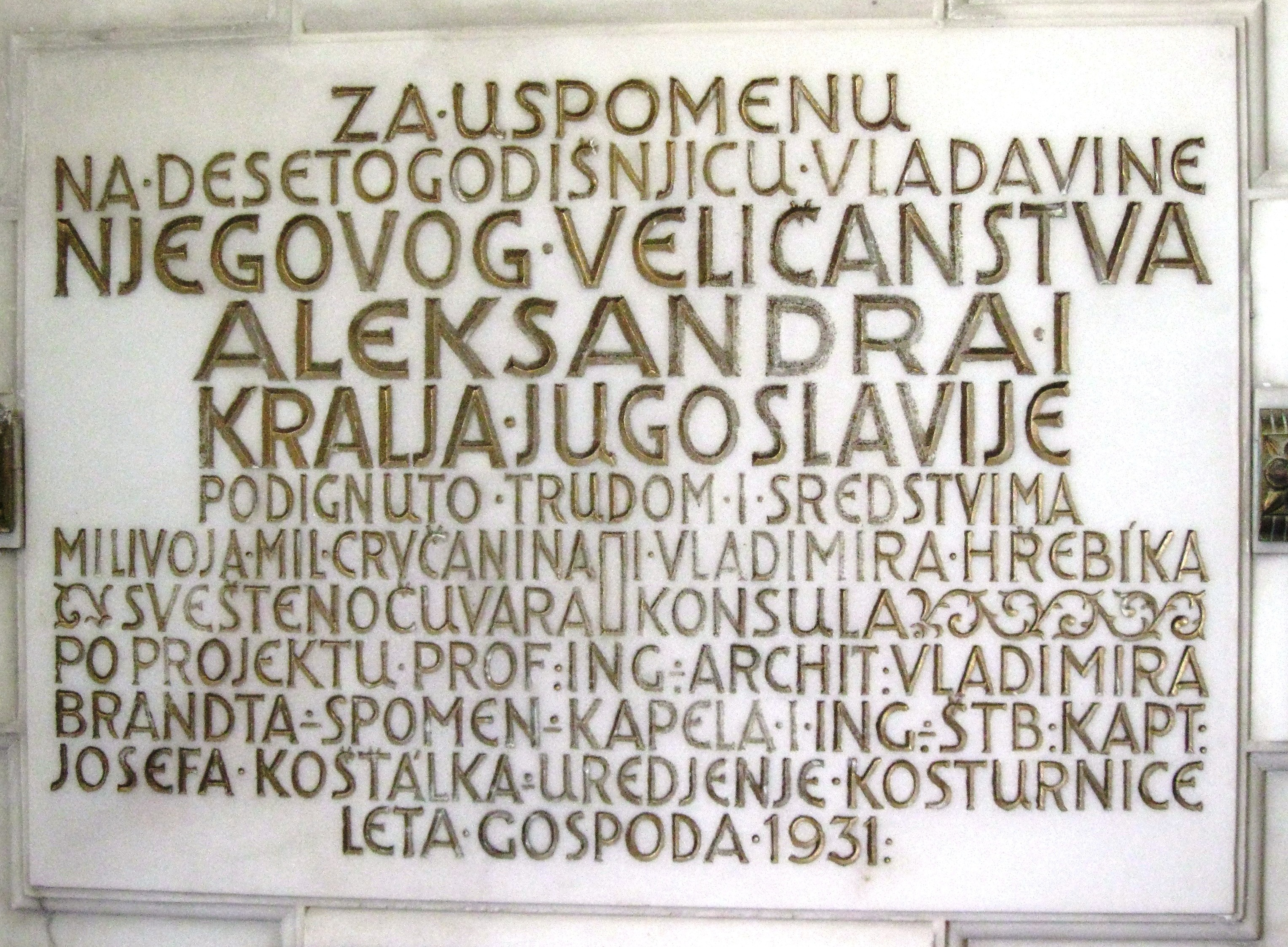 Мермерна плоча у спомен костурници у Јиндриховицама.